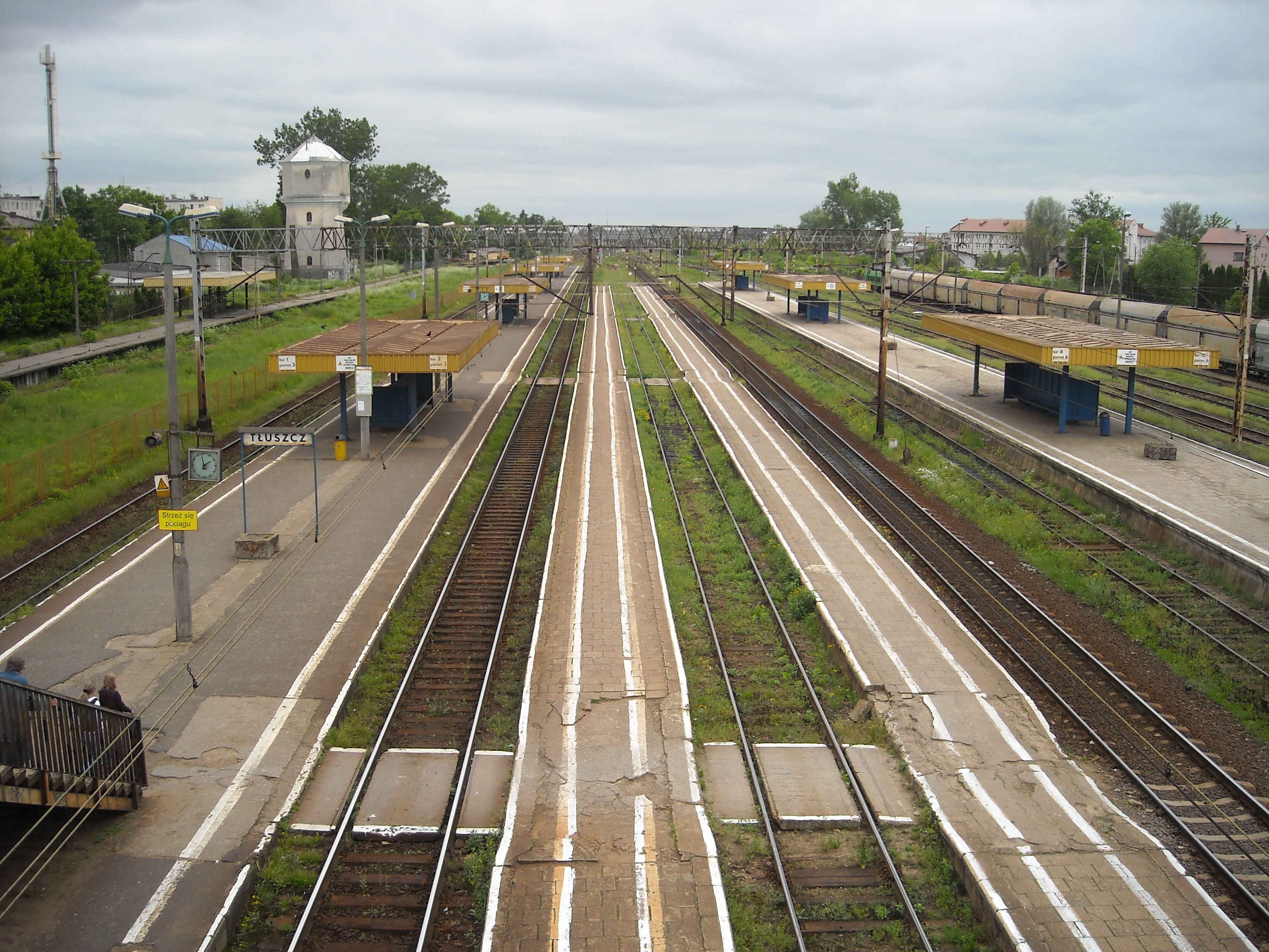 Stacja kolejowa Tłuszcz. Widok na perony. Po lewej widoczna wieża ciśnień.